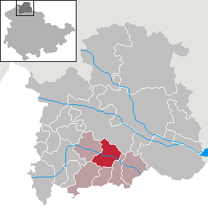 Gemeinde Nohra in Thüringen, Landkreis Nordhausen